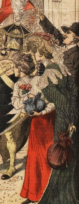 Deux dames et un homme lancent des confettis au passage du cortège de Marie Missiaux, Reine des Reines de la rive droite, à la Mi-Carême 1903 à Paris.